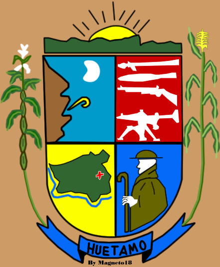 Escudo del municipio de huetamo, Estado de Michoacan, Mexico